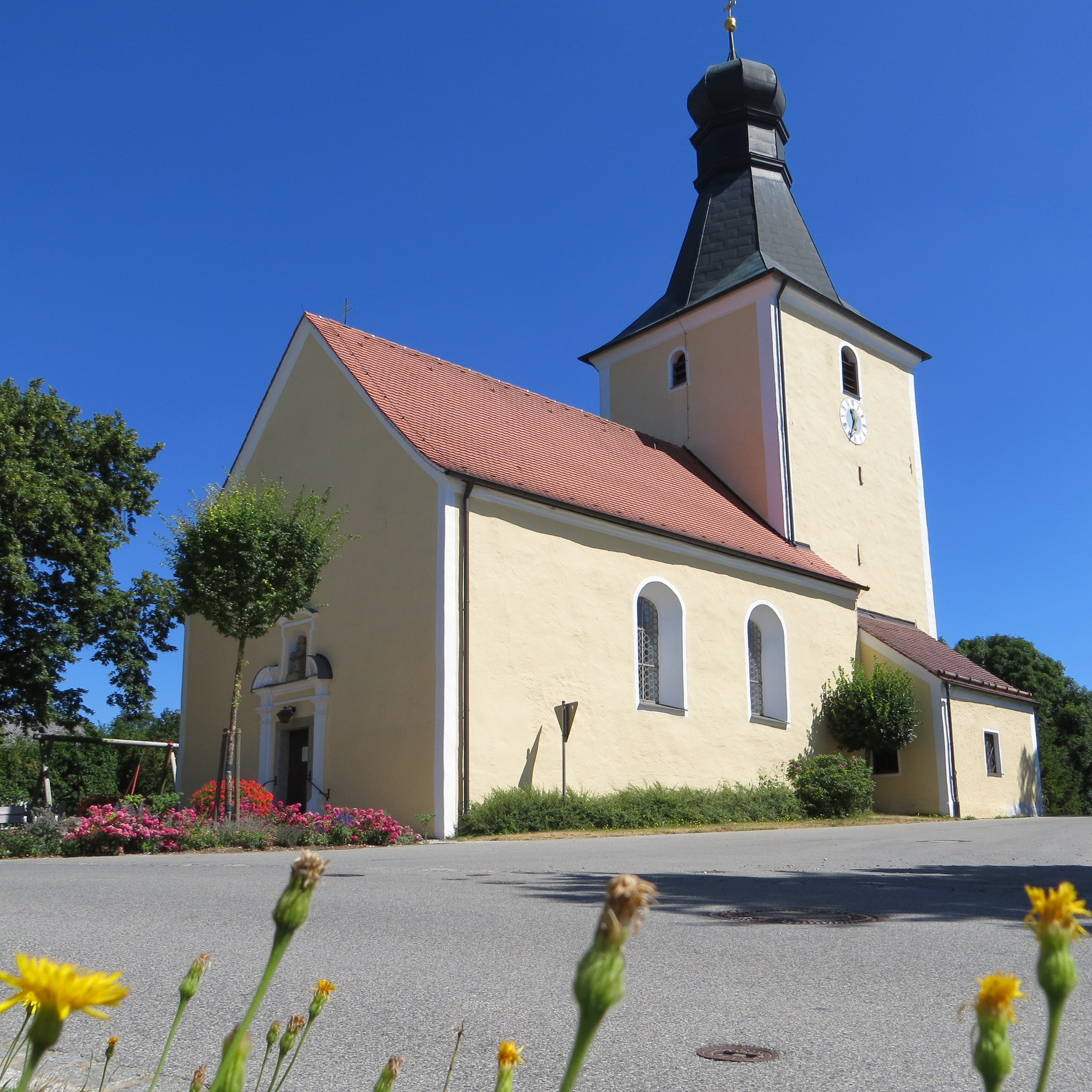 St. Stephan - Langenthonhausen